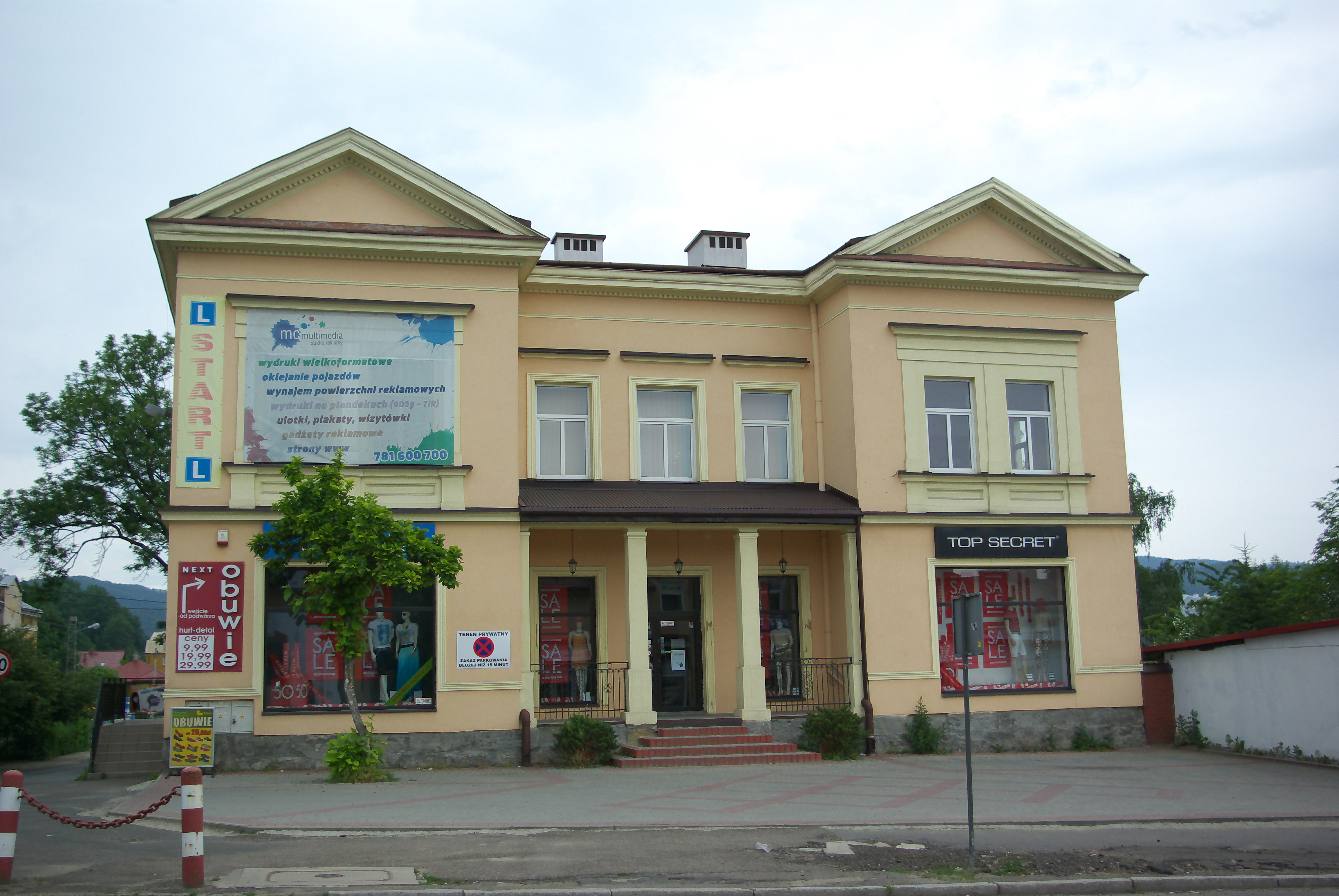 Budynek przy ulicy Podgórze 2 w Sanoku